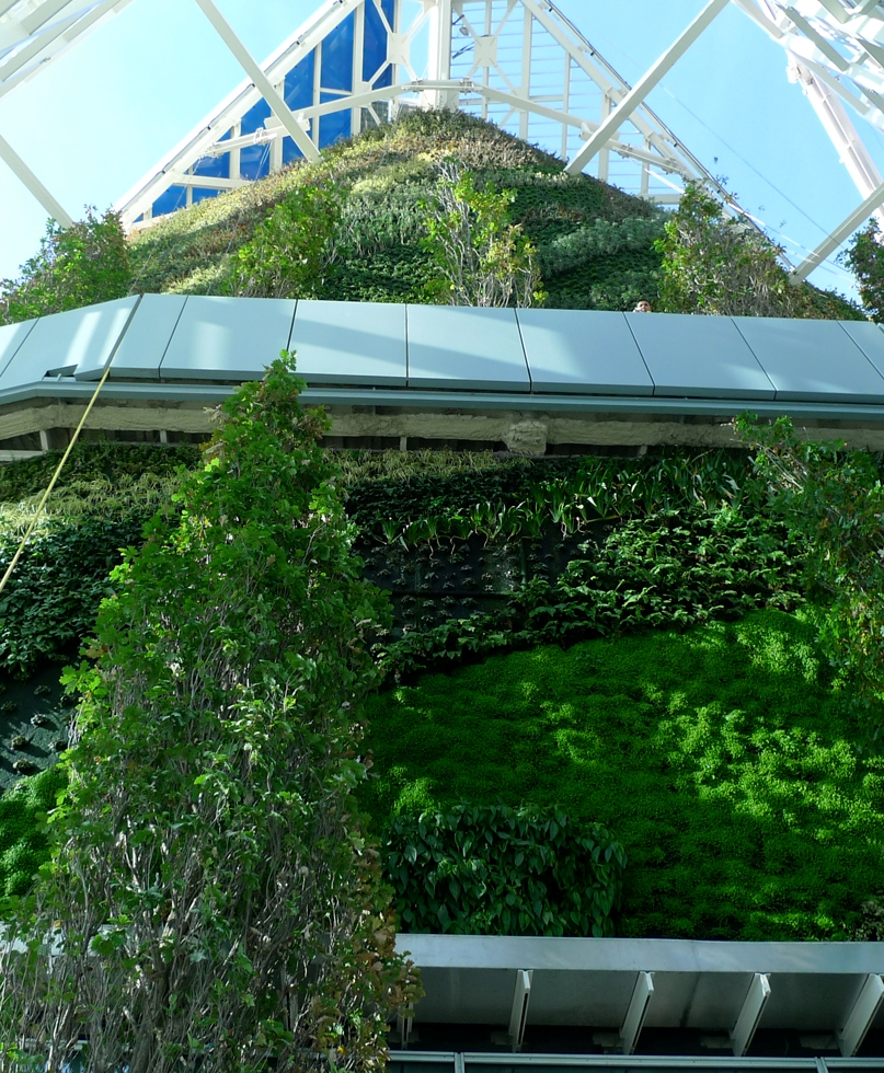 Foto del jardín vertical de la Torre de Cristal